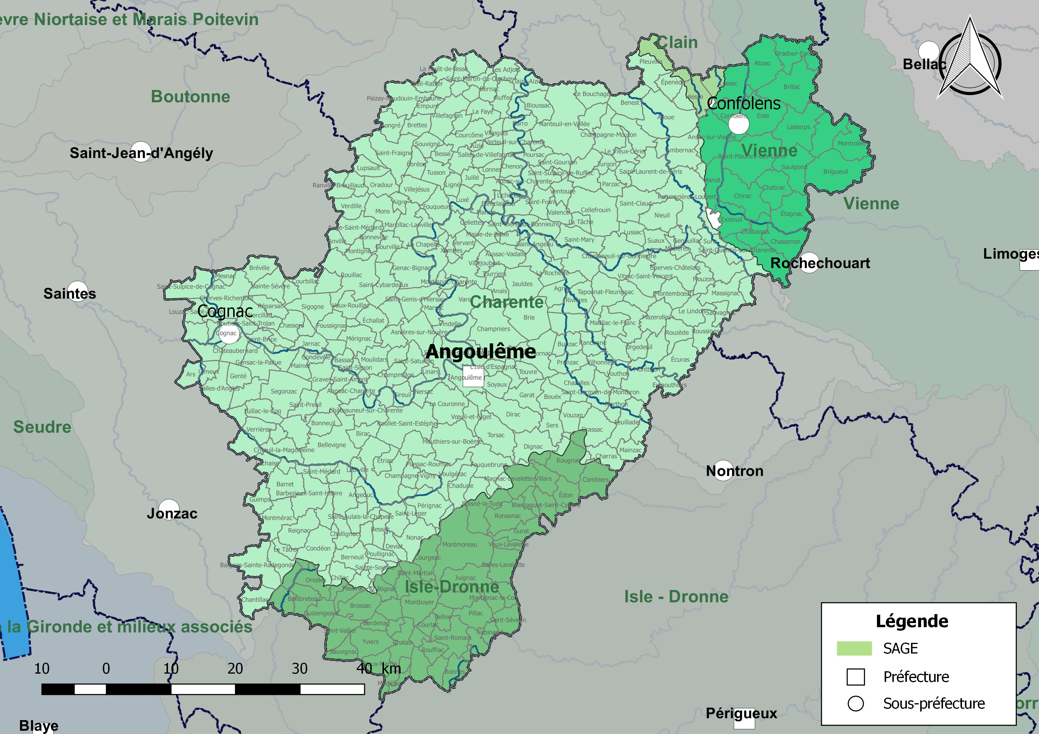 Carte des schémas d'aménagement et de gestion des eaux (SAGE) concernant le département de la Charente (France) au 1er janvier 2018.